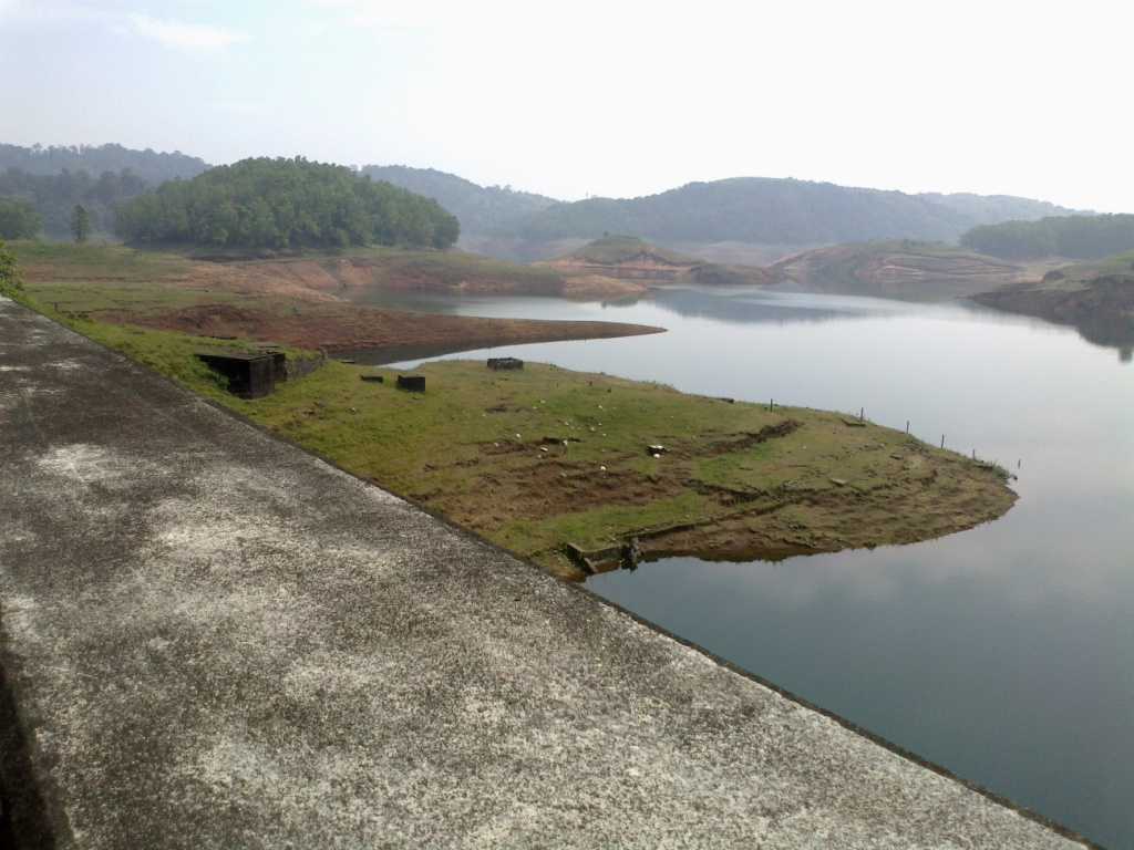 Kulamavu Dam